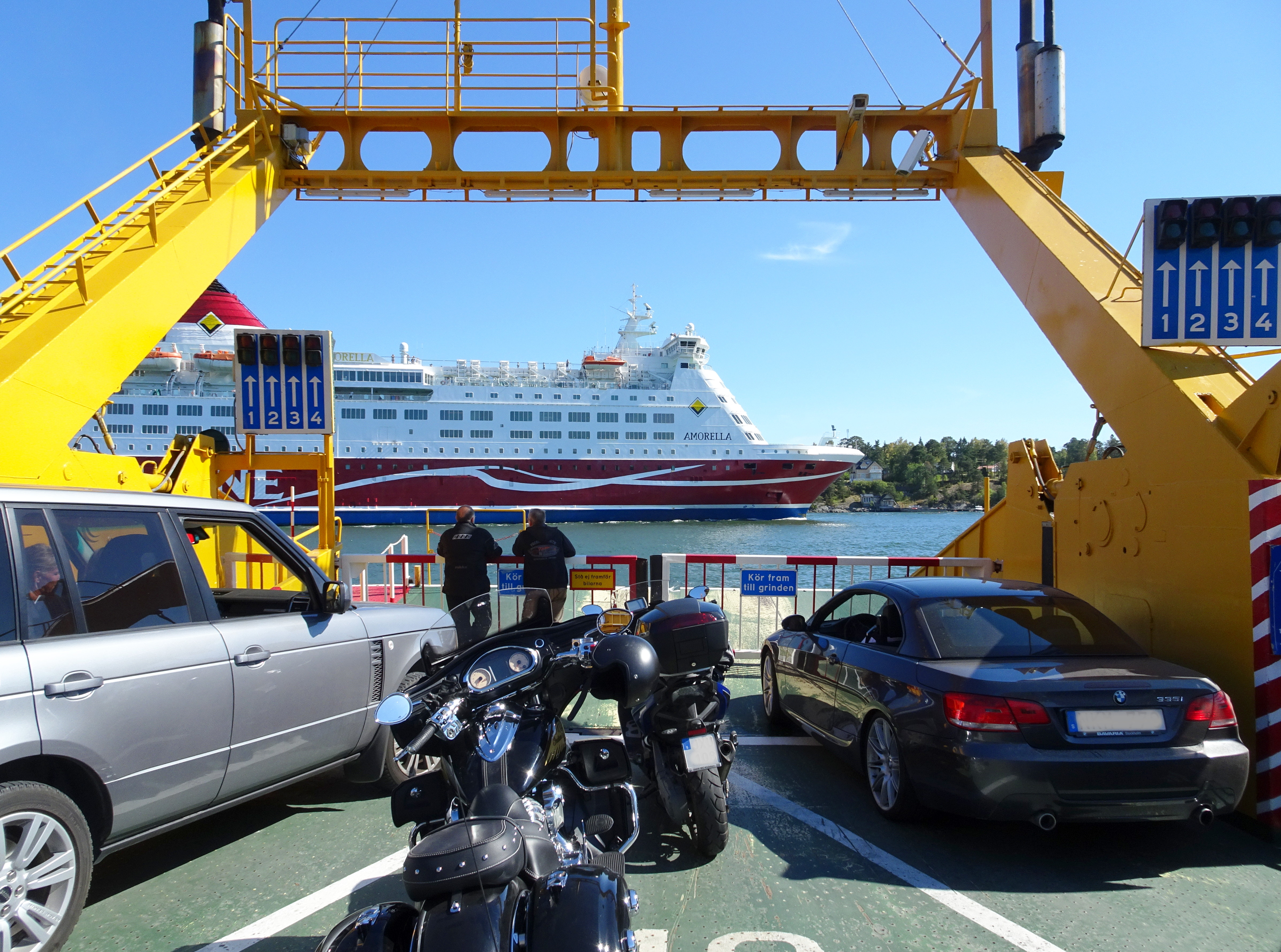 På Furusundsleden mot Yxlan